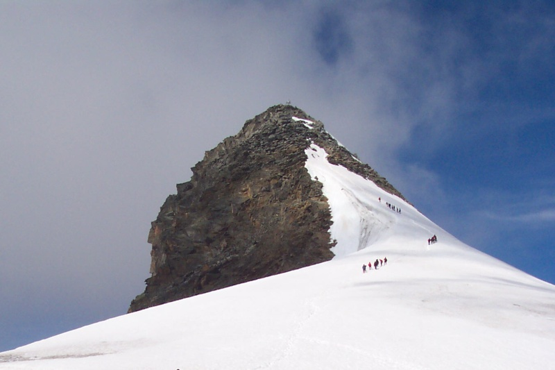 Zuckerhütl